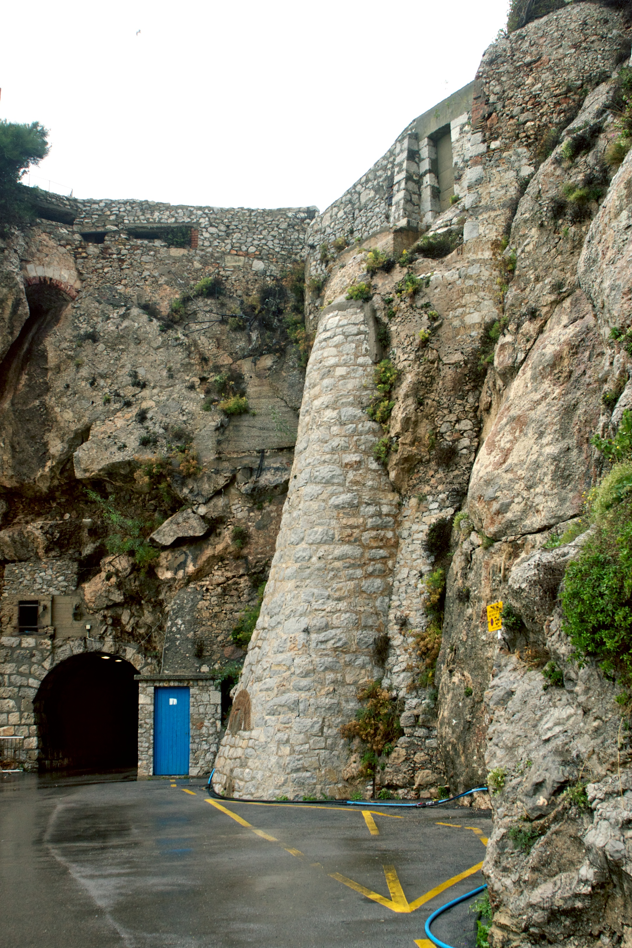 Rosia Gibraltar